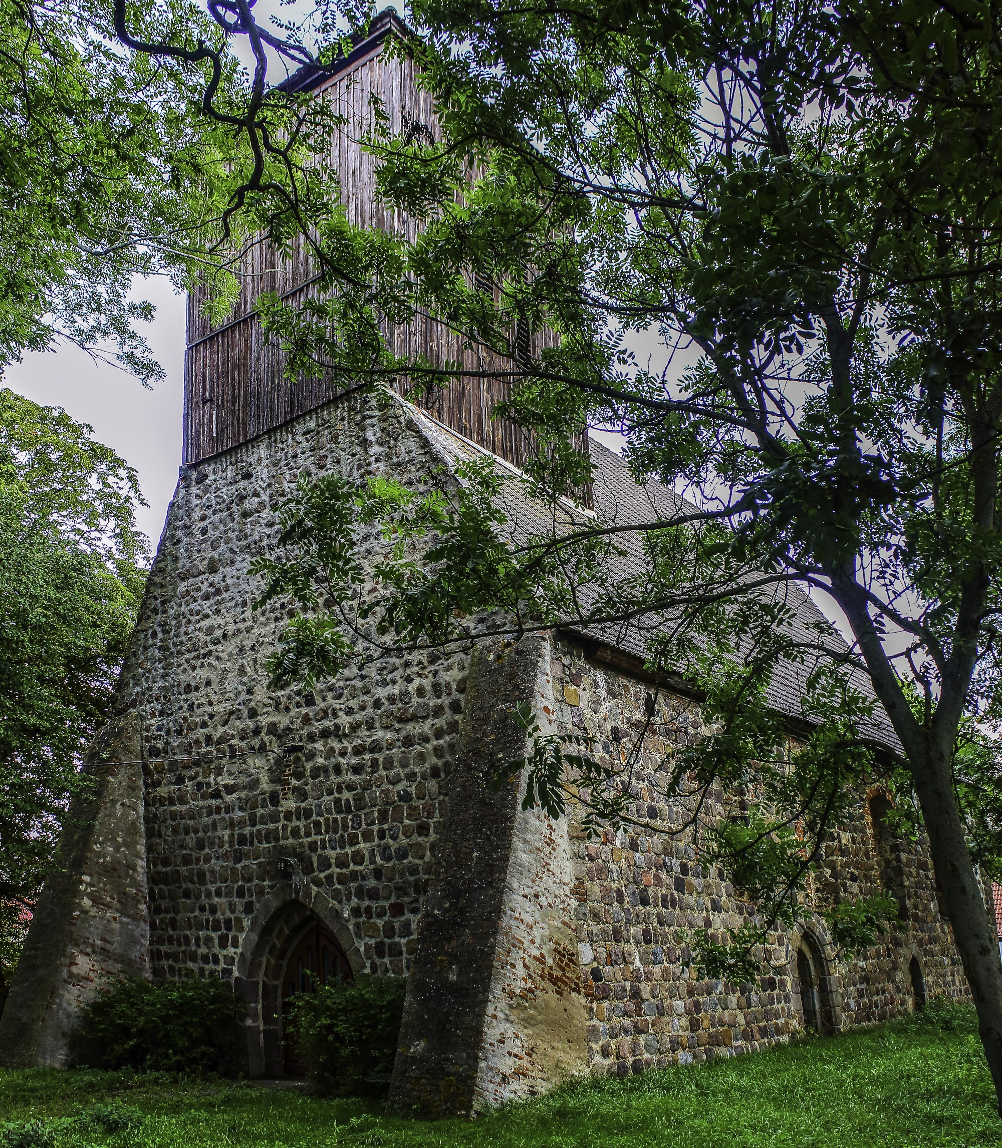 Steinhöfel Feldsteinkirche